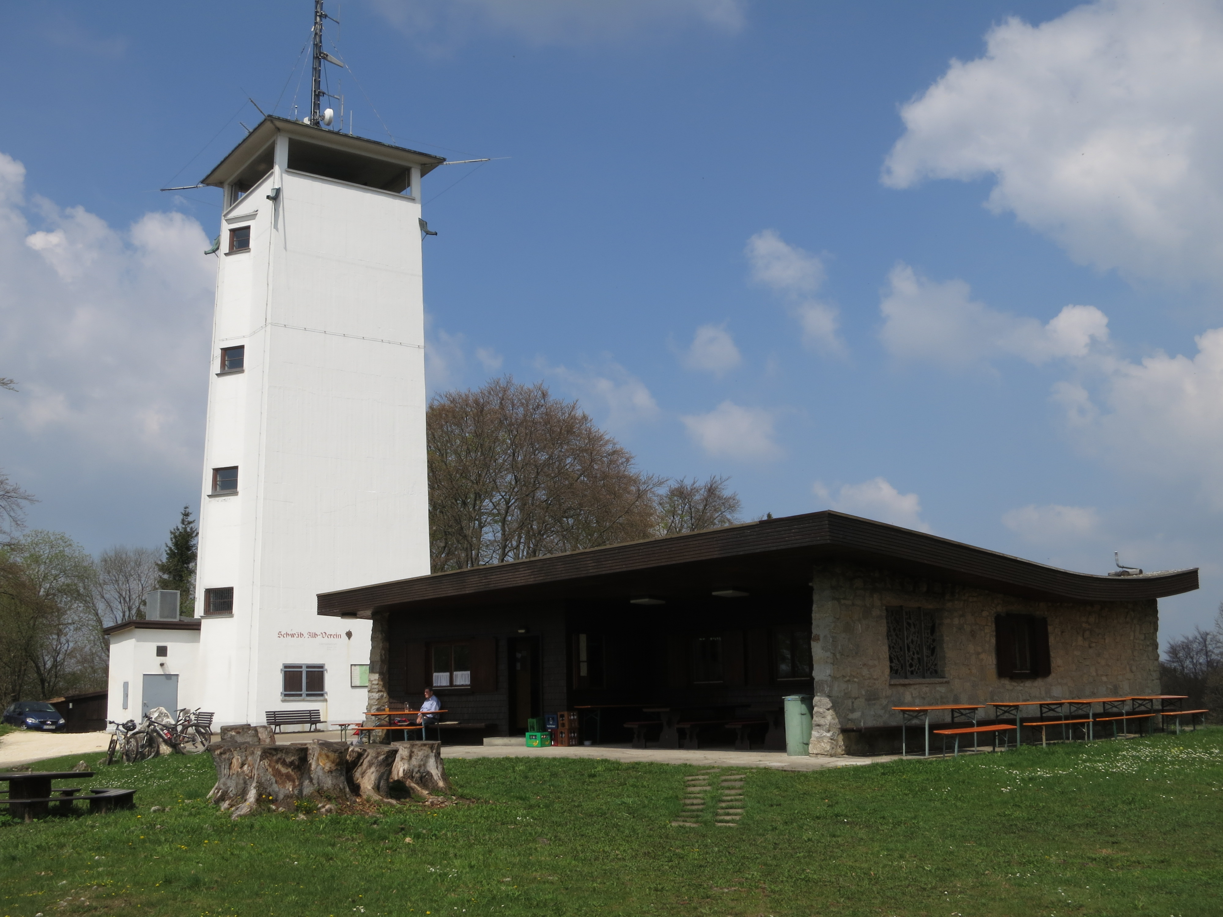 Volkmarsbergturm bei Oberkochen.